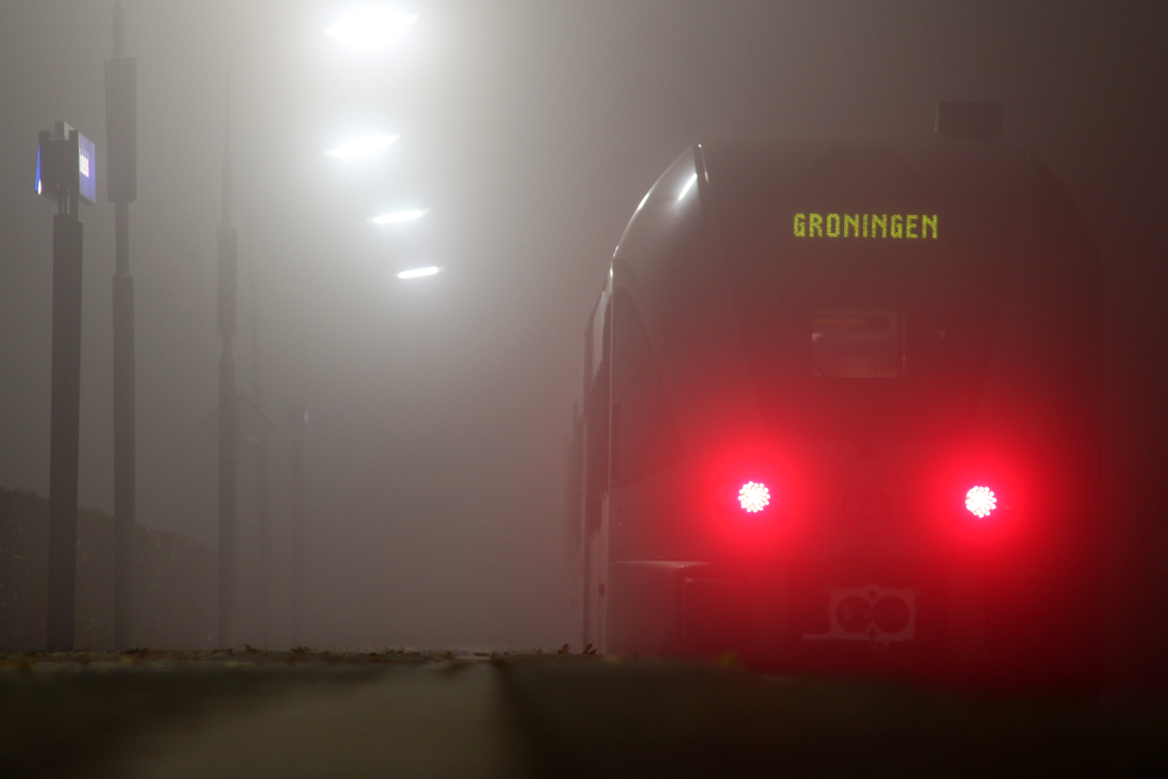 Een Arriva GTW Spurt 2/8 staat in vroeg in de avond gereed op het station van Roodeschool om te vertrekken richting Groningen.